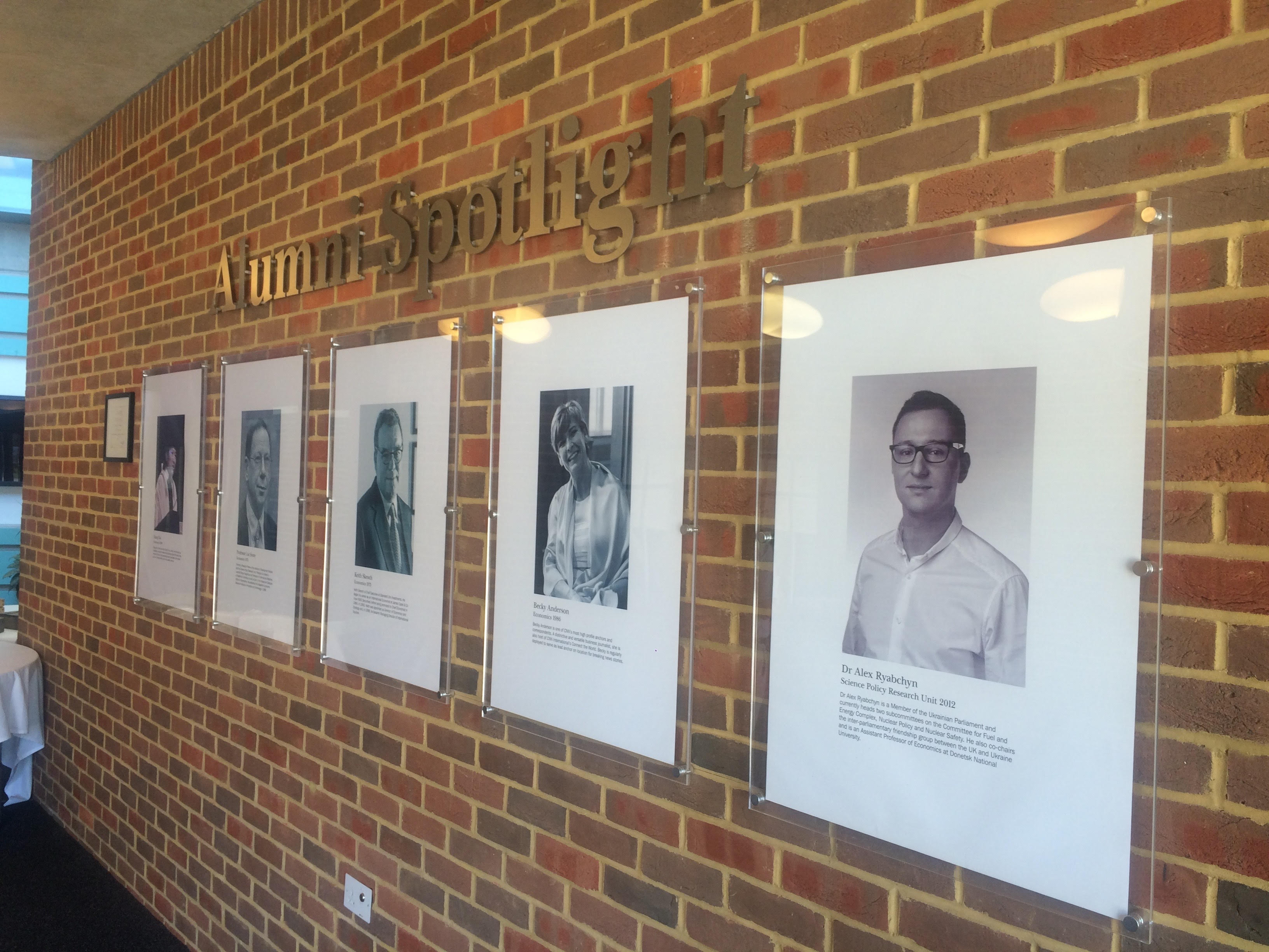 Олексій Рябчин Sussex uni